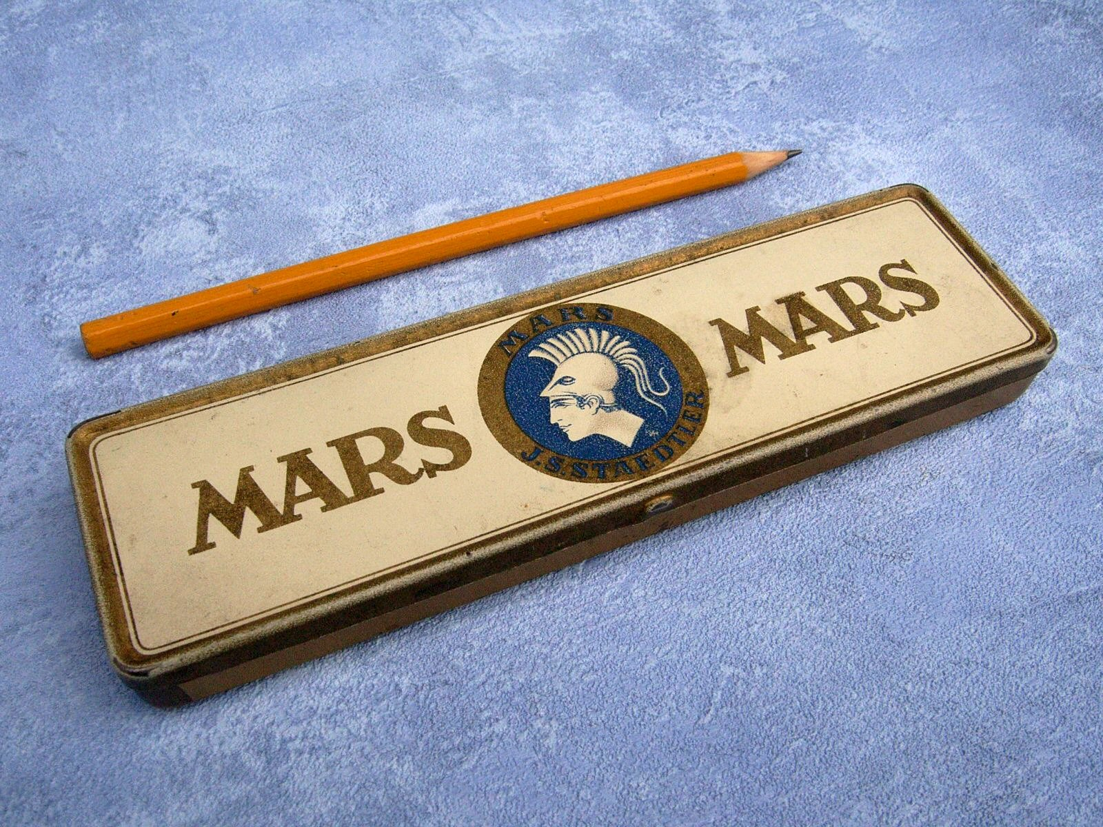 Mars,Staedtler,Stiftdose